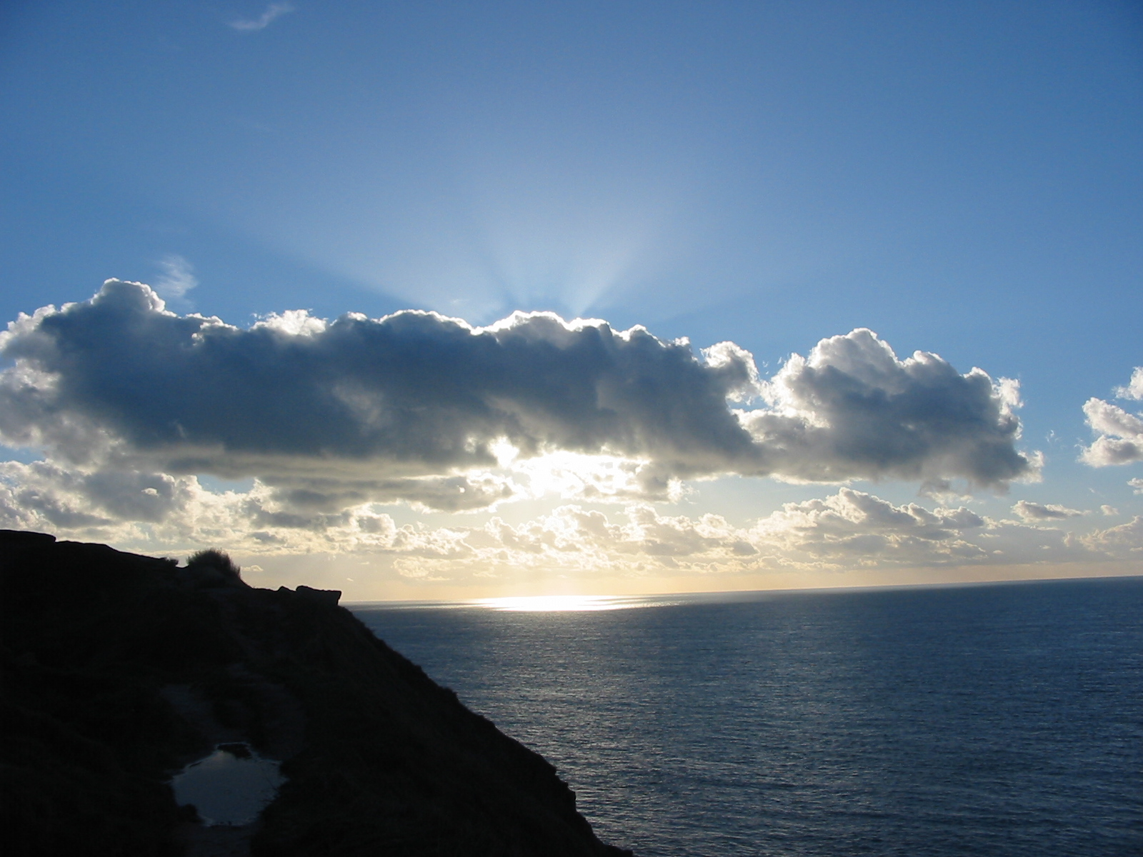 Cap Gris Nez, taken by user:Donarreiskoffer